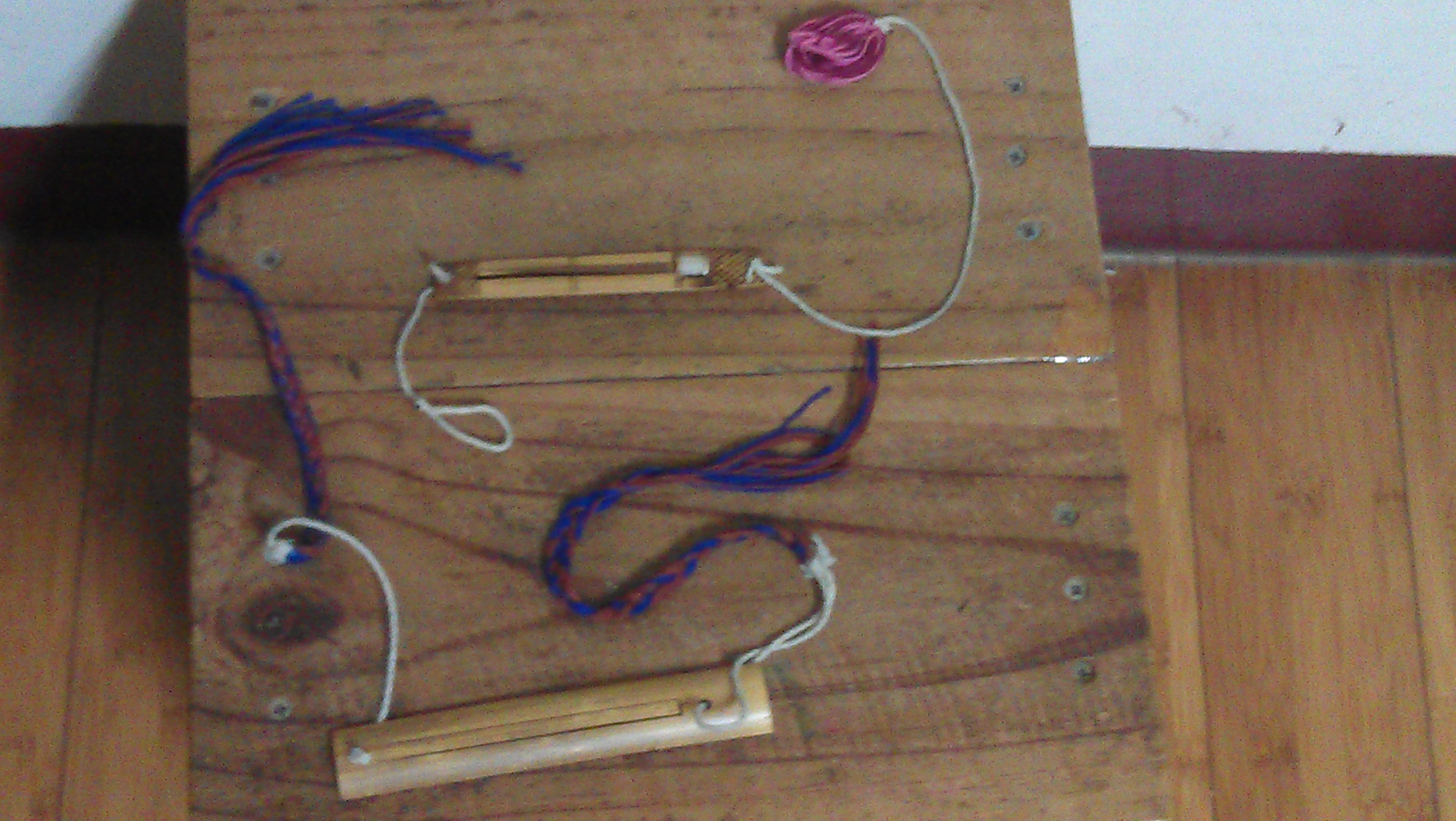 中文（台灣）: 臺灣原住民口簧琴